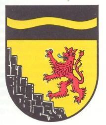 Wappen von Niederstaufenbach